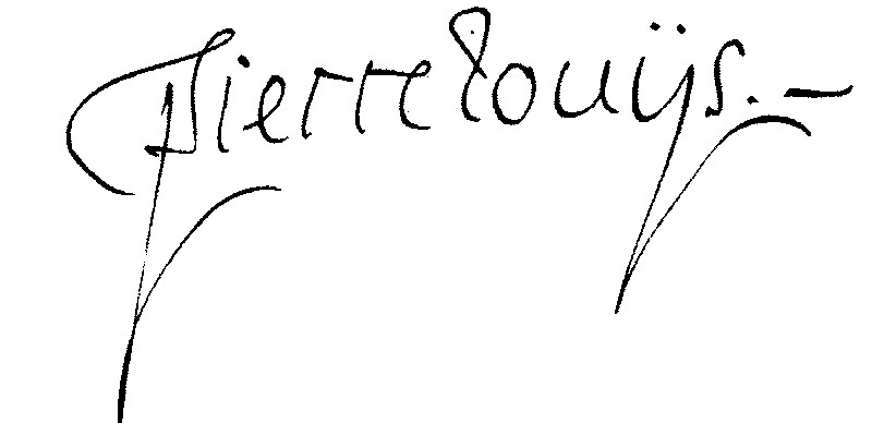 Signature de Pierre Louÿs (lettre de 1898).